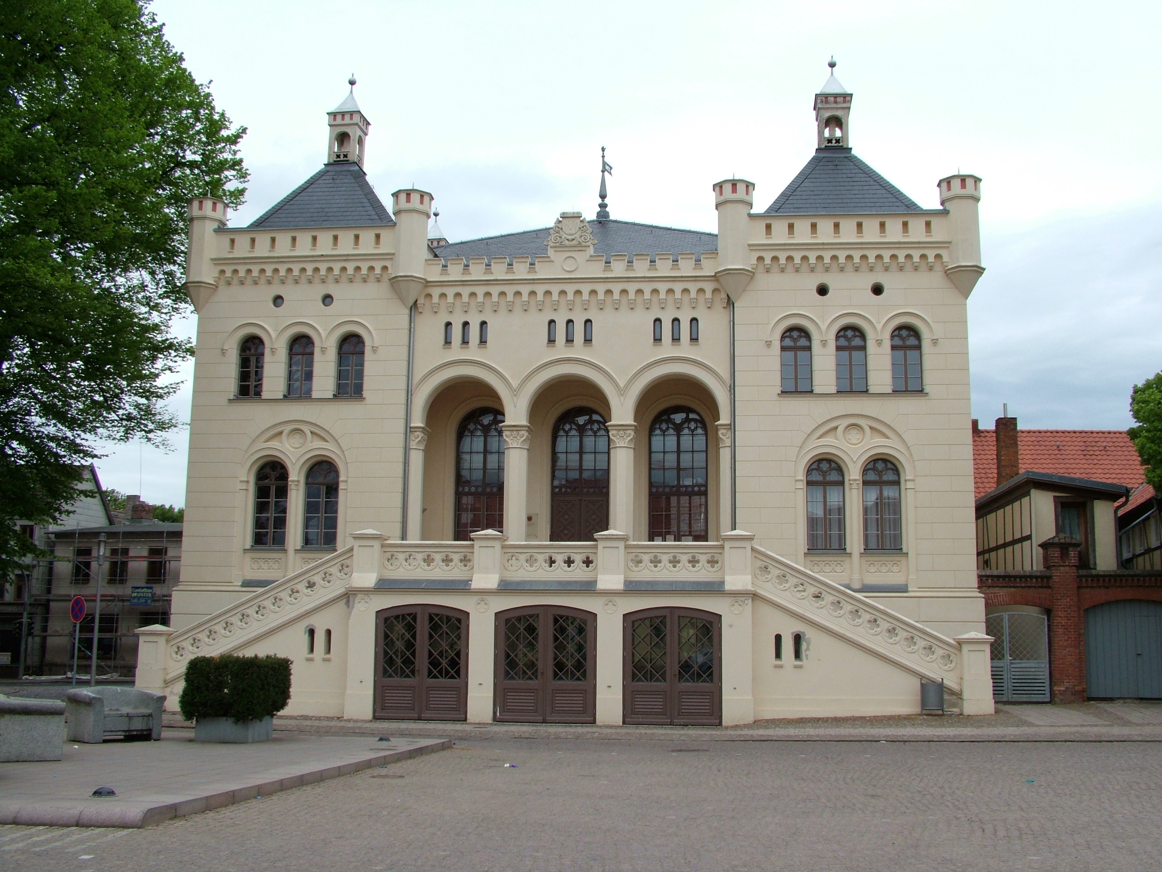 Das Rathaus in Wittenburg. Selber aufgenommen am 15. Mai 2005.